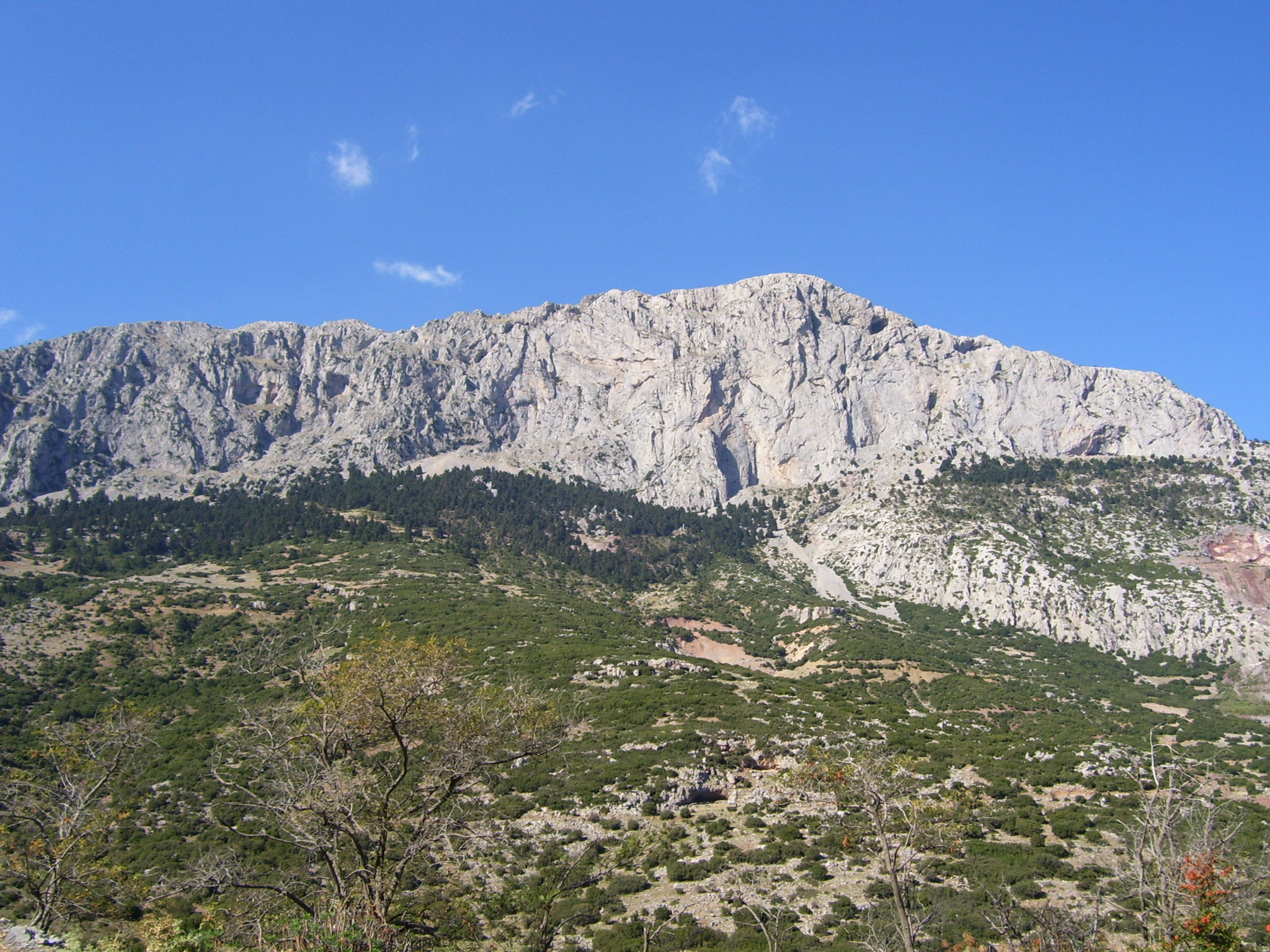 Mountain Parnassos